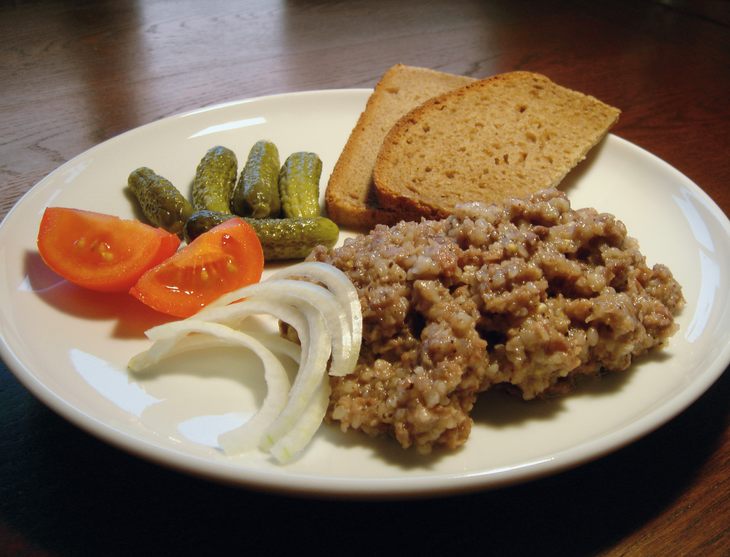 Stippgruetze being served on plate